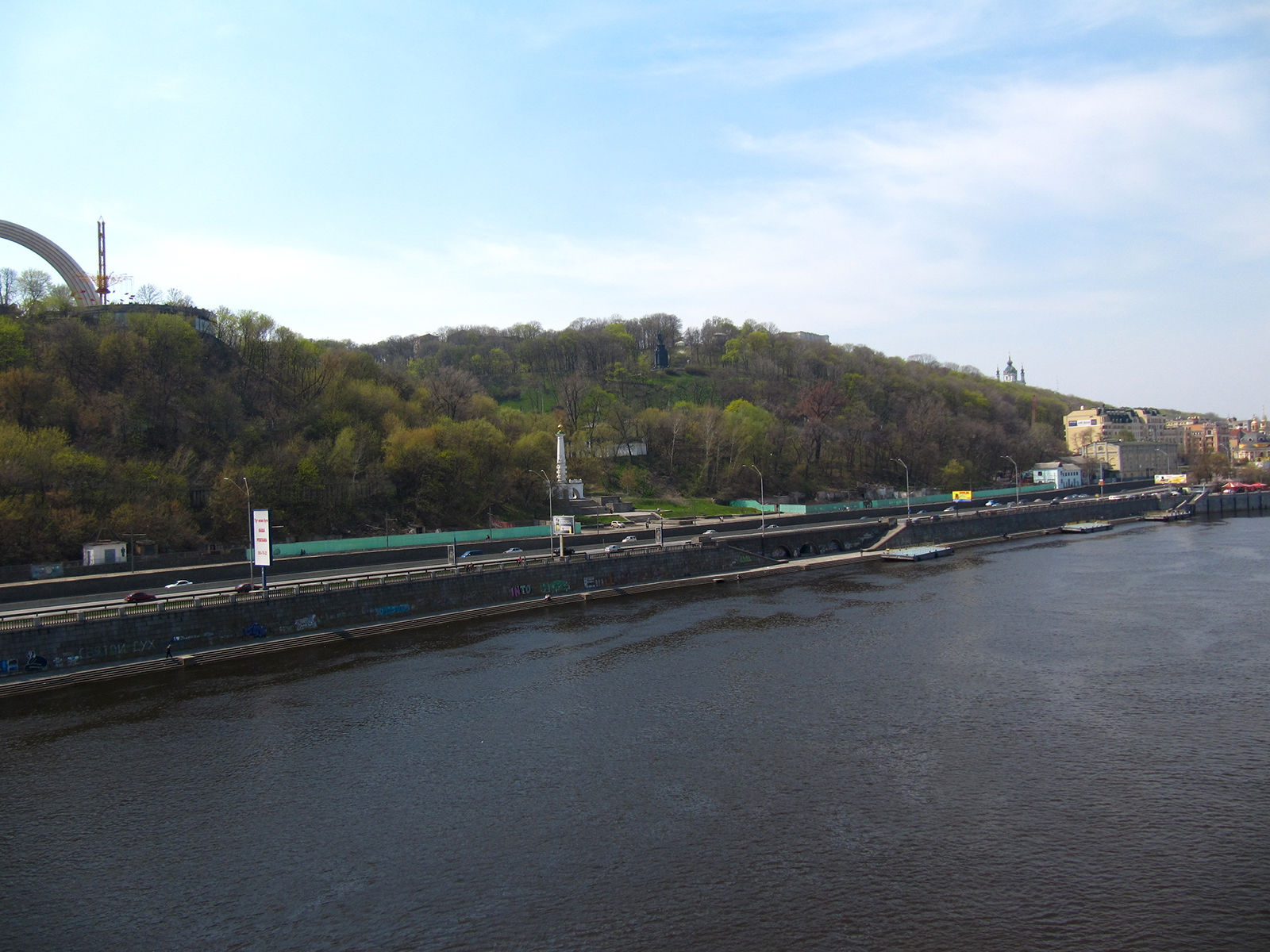 Панорама з Пішоходного мосту. Вид на Володимирську гірку, арку Дружби народів, колону Магдебурзького права, Андріївську церкву, річковий порт.